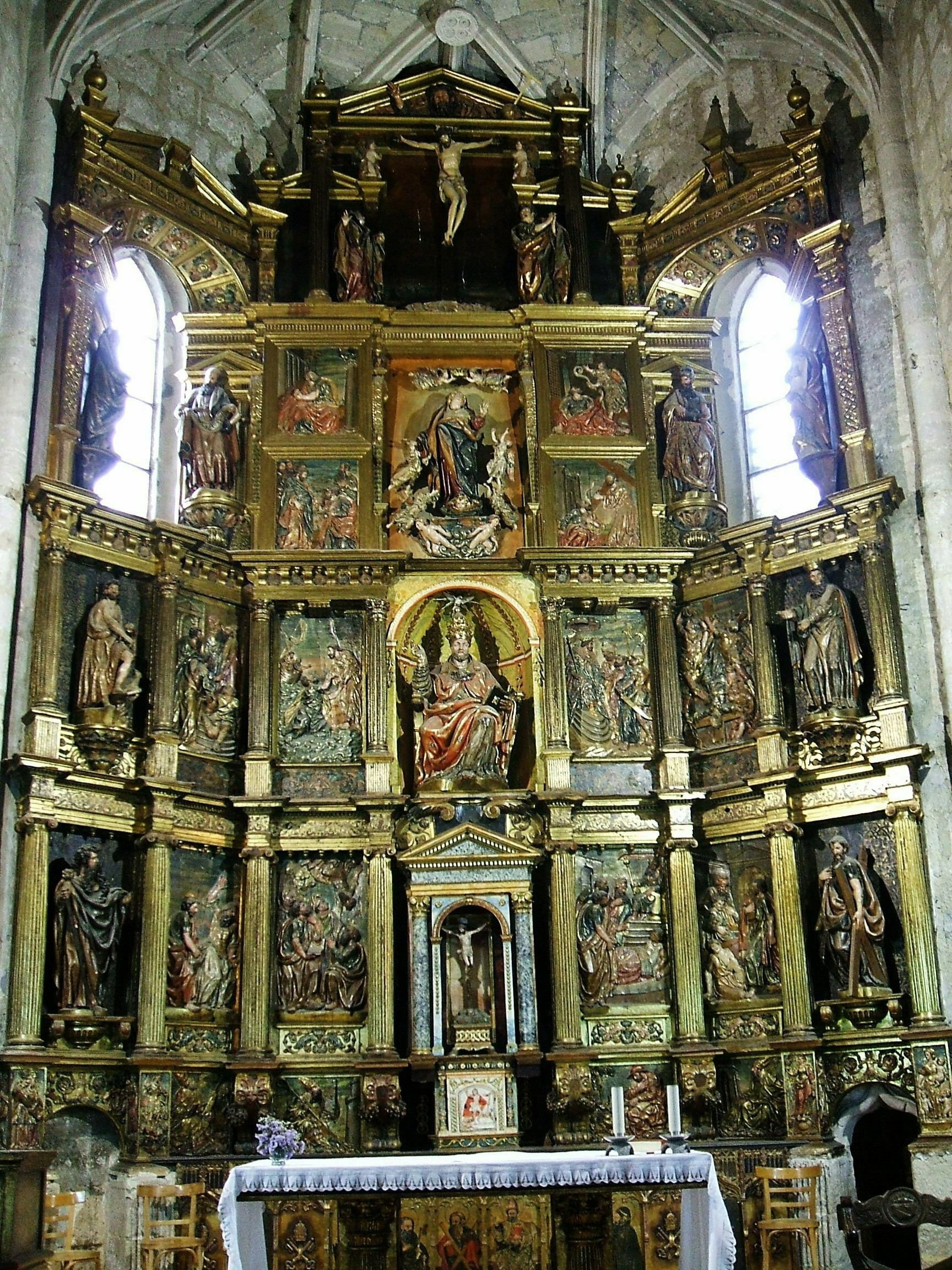 Retablo Mayor renacentista (s-XVI), realizado por Hernando de Nestosa, en la Iglesia de San Pedro, Astudillo, Palencia, Castilla y León, España